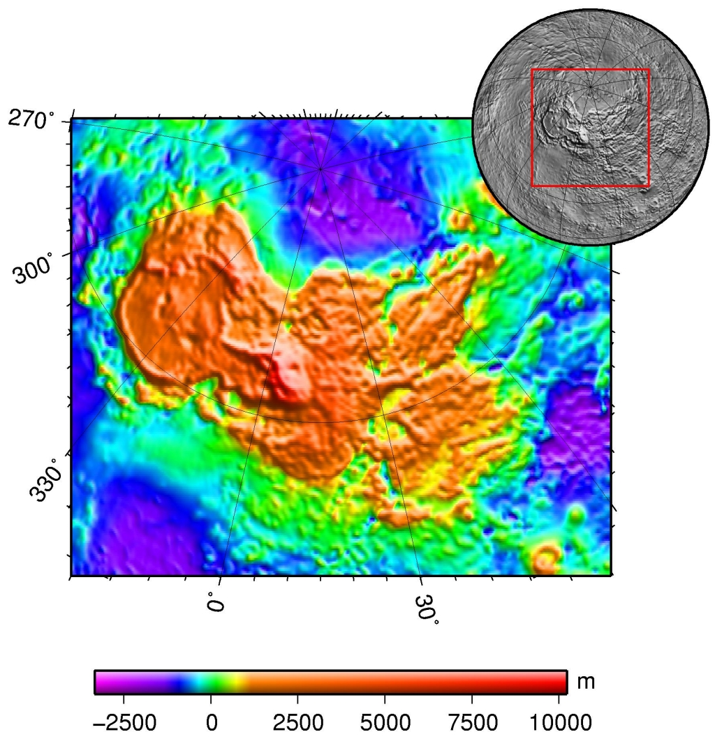 Ishtar Terra (Venus) topography